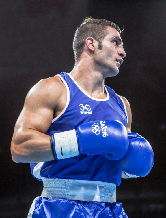 Day 3